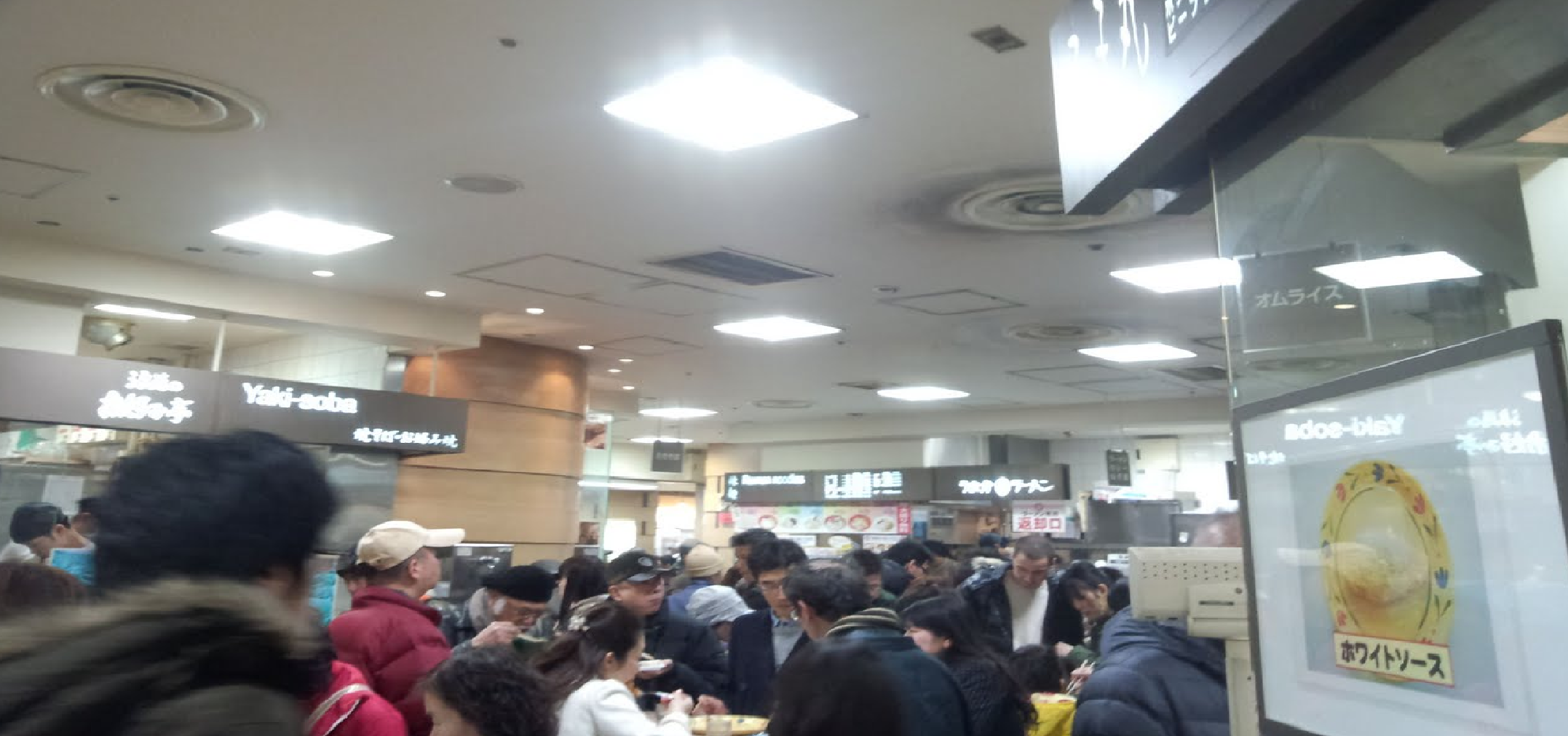 大阪梅田の阪神百貨店梅田地下1階にあるスナックパークの様子